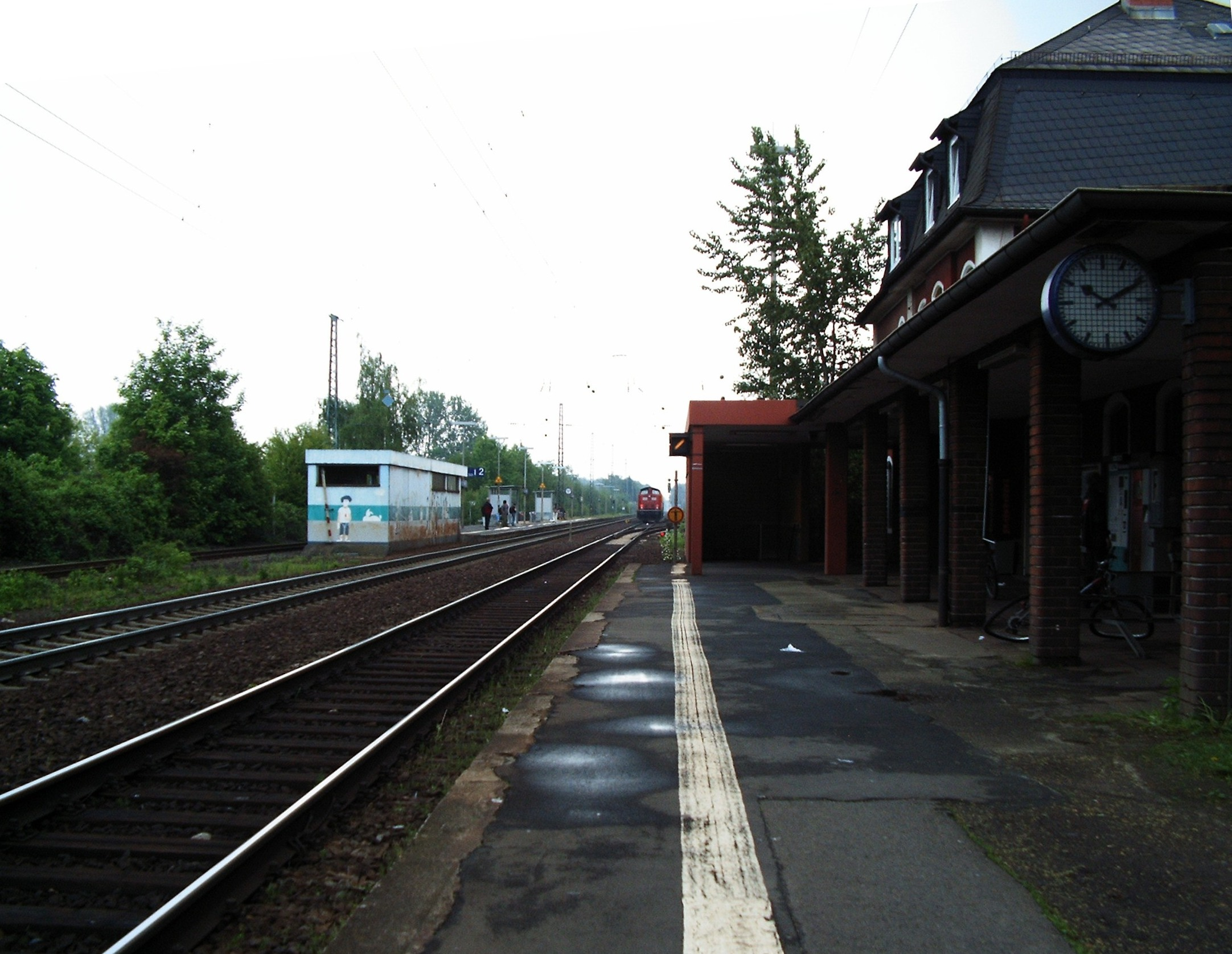 Bahnhof Maintal Ost vom Gleis 1, in Richtung Osten, zum Gleis 2+3.